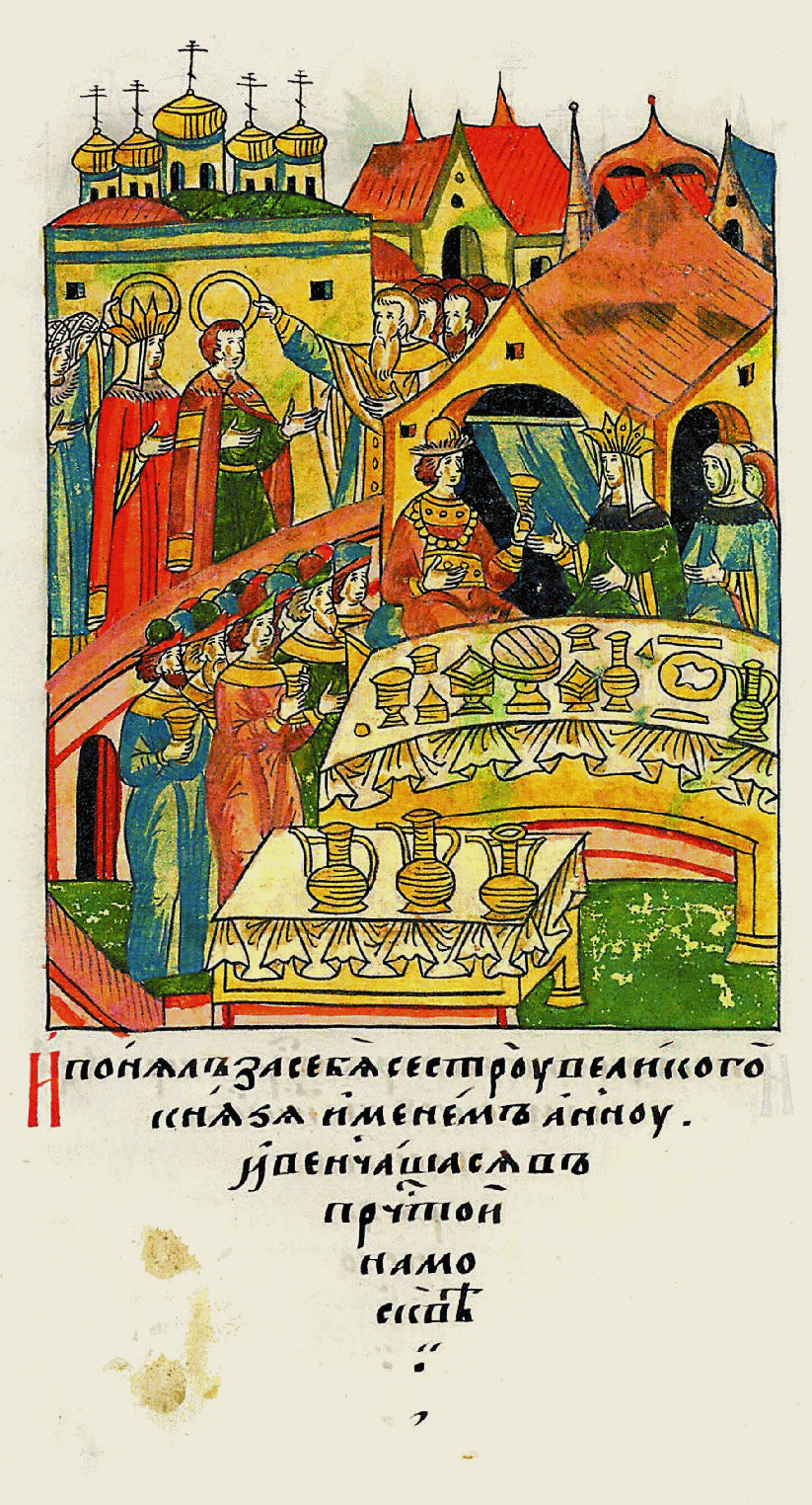 А казну свою всю и Романов городок, и во- лости, и села во всем великом княжении, что были за великими княгинями прежними, и что сам взял у из- менников многое множество, и что прикупил, то все дал своей великой княги- не Марии.